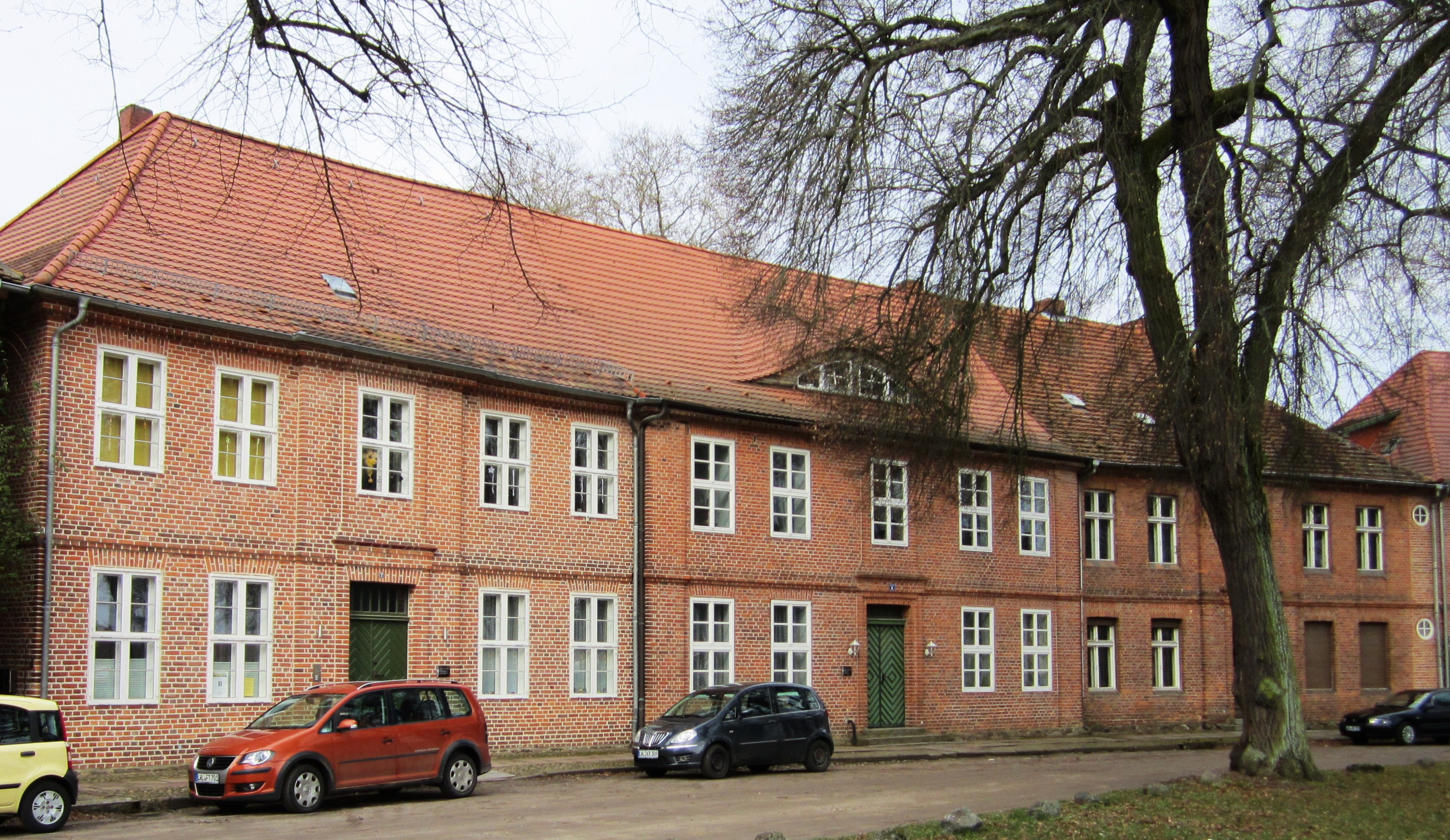 Ludwigslust, Am Bassin Nrn. 5, 6 und 7. Denkmalgeschütztes Gebäude